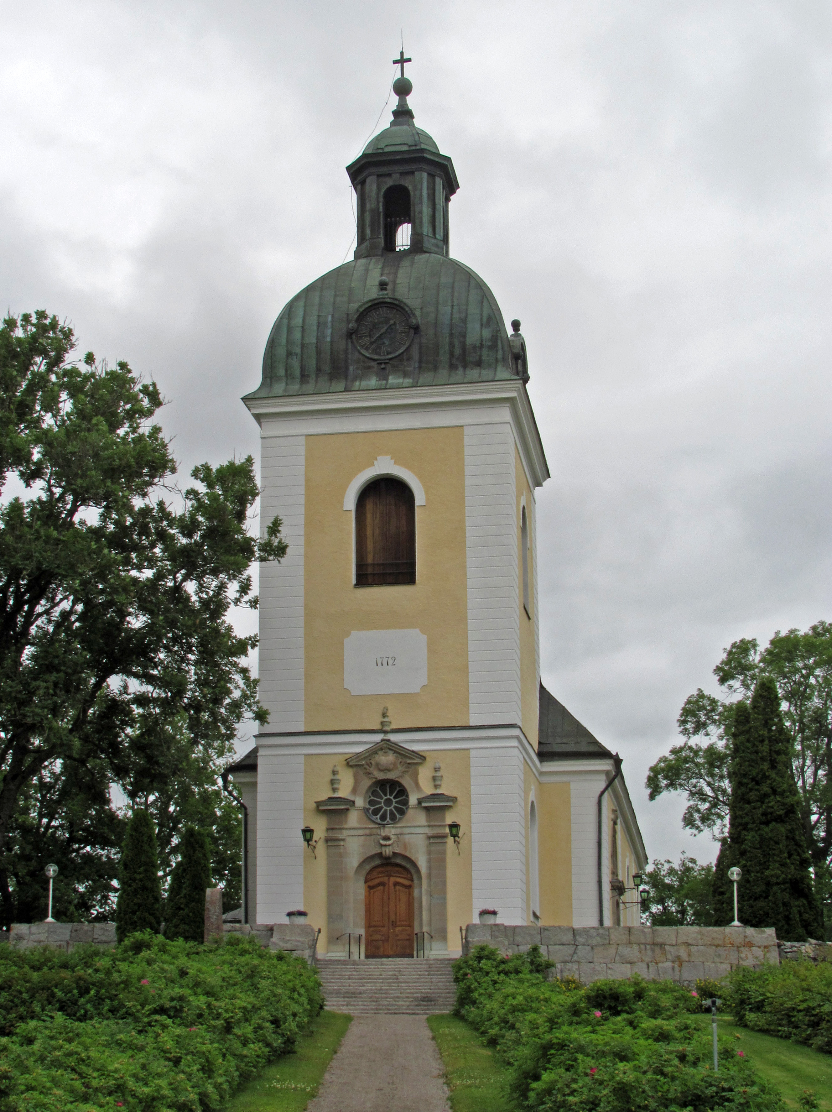 Skultuna kyrka